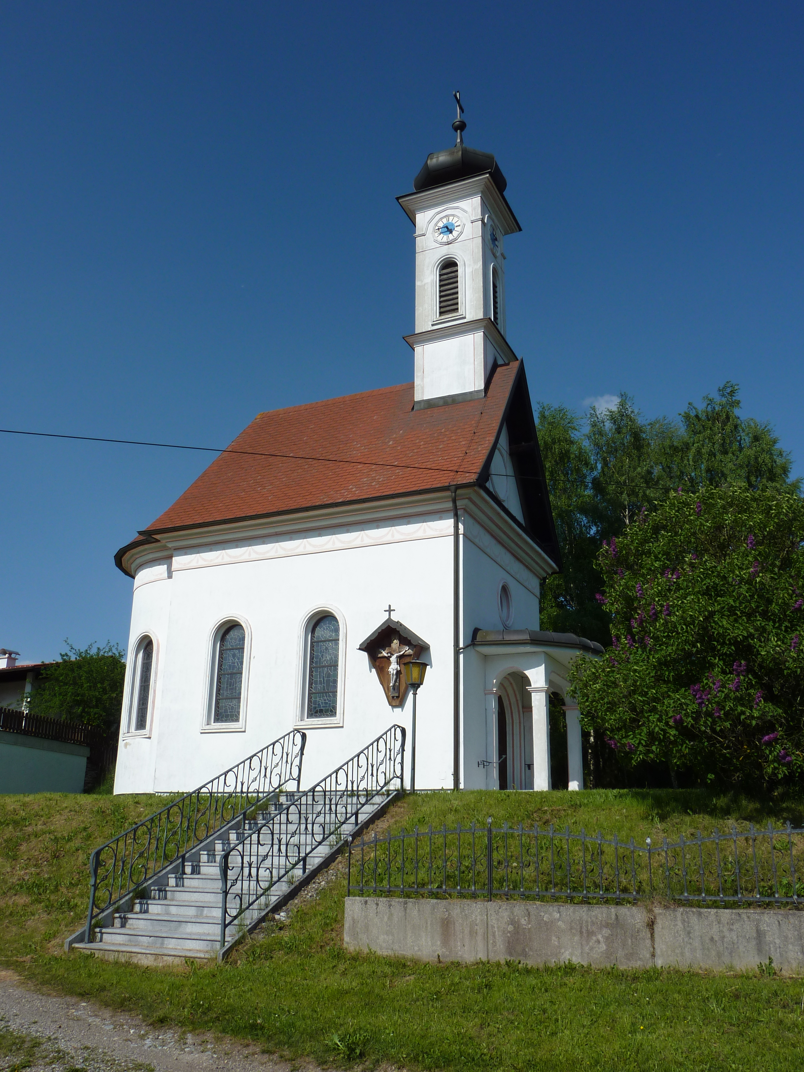 Ortskapelle Voitschlag, Sallingberg, Niederösterreich